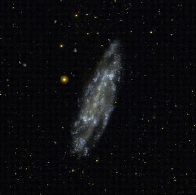 NGC 4236